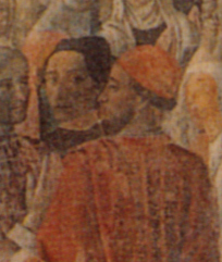 Cappella del miracolo, cosimo rosselli, miracolo del calice, dettaglio, autoritratto di rosselli